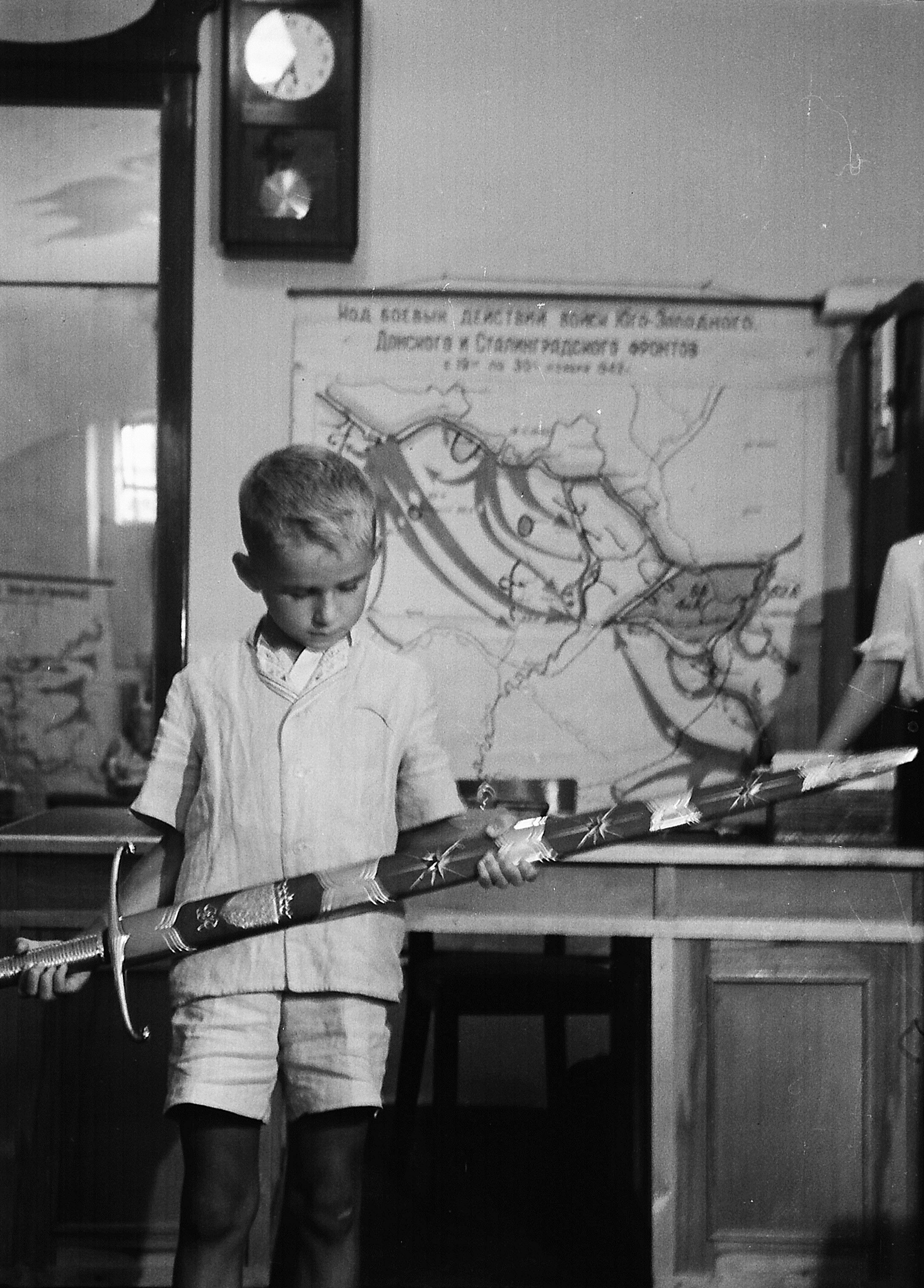 Меч Сталинграда в музее обороны Царицына-Сталинграда. 1951 год.